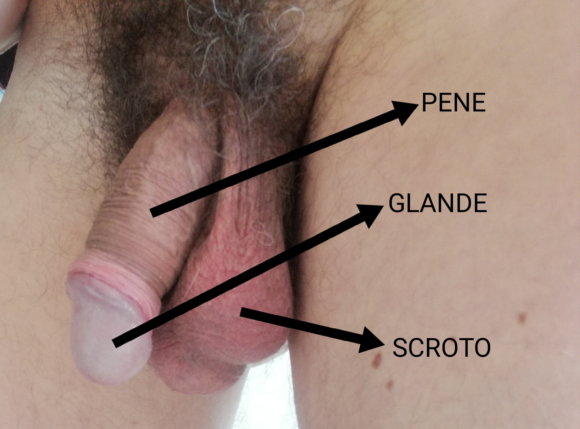 Visione esterna dell'apparato geniale maschile umano